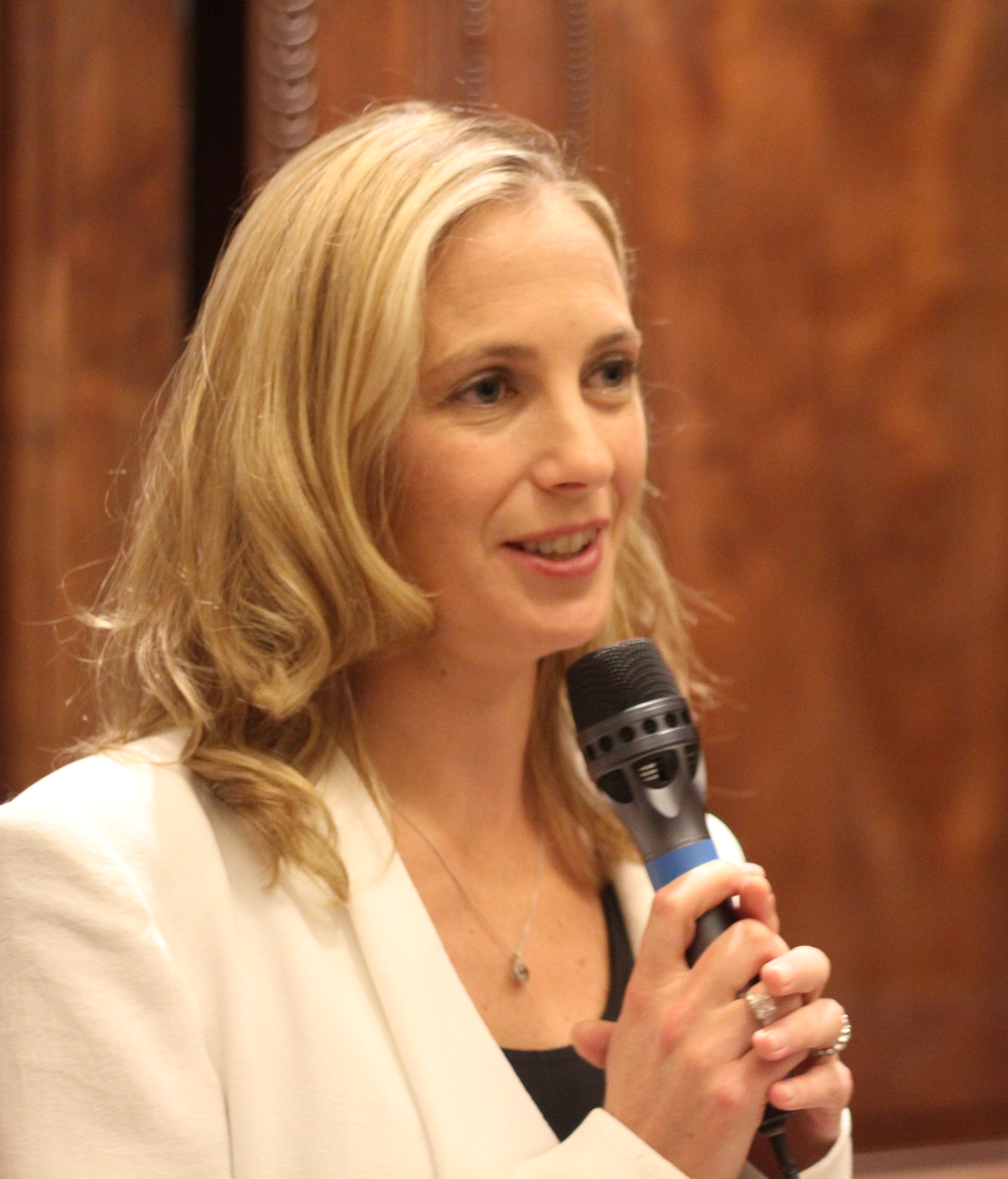 Lauren Weisberger et son éditrice française, Deborah Druba